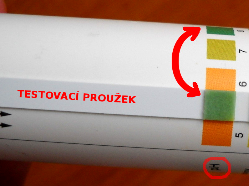 Testovací proužek ukazuje na zásaditou moč. Podle zbarvení je pH testované moči přibližně 8. Fyziologické pH moči má být v rozmezí 5,0–6,5, ale záleží to také na okolnostech.